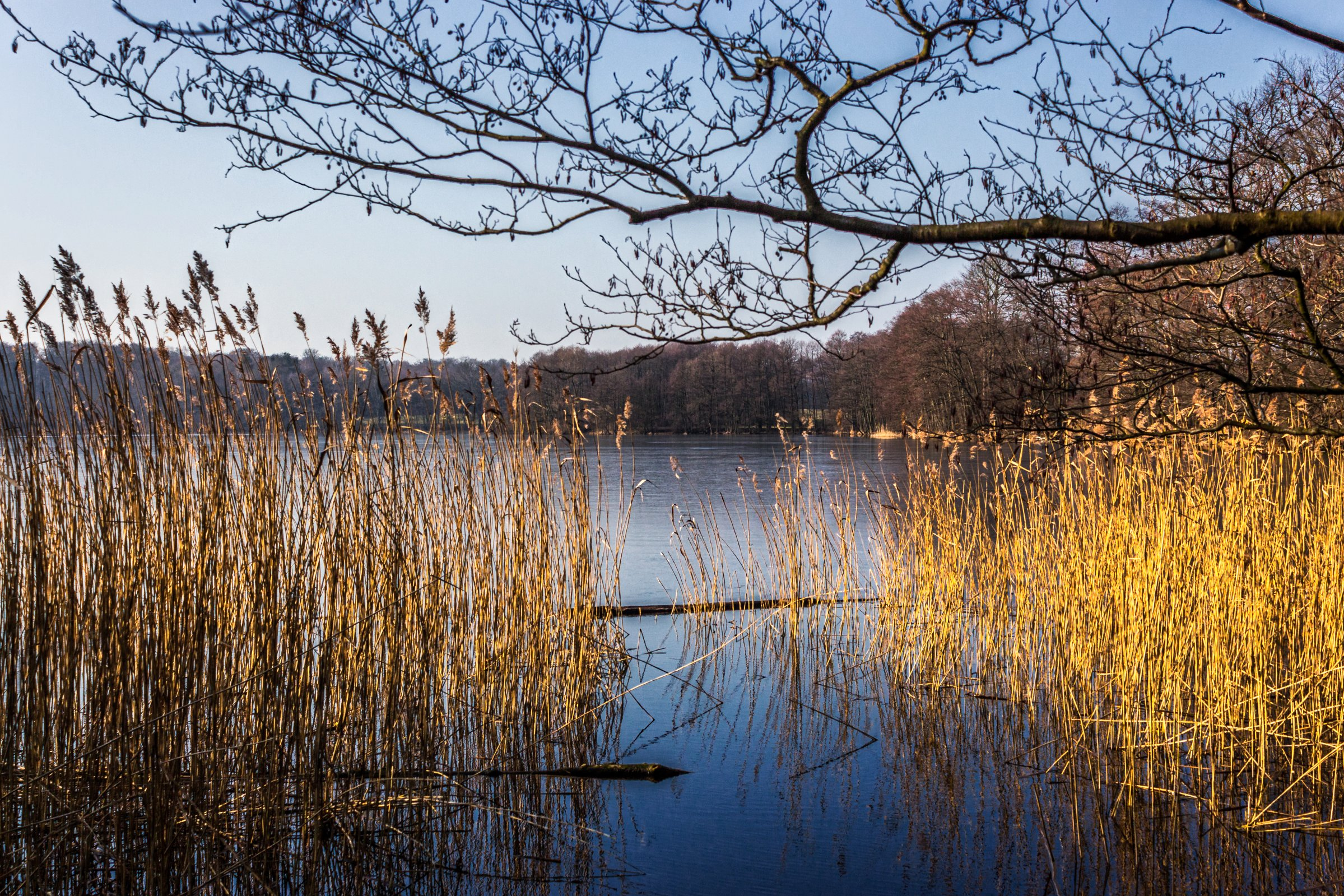 Glambecker See im Naturschutzgebiet „Grumsiner Forst/Redernswalde“